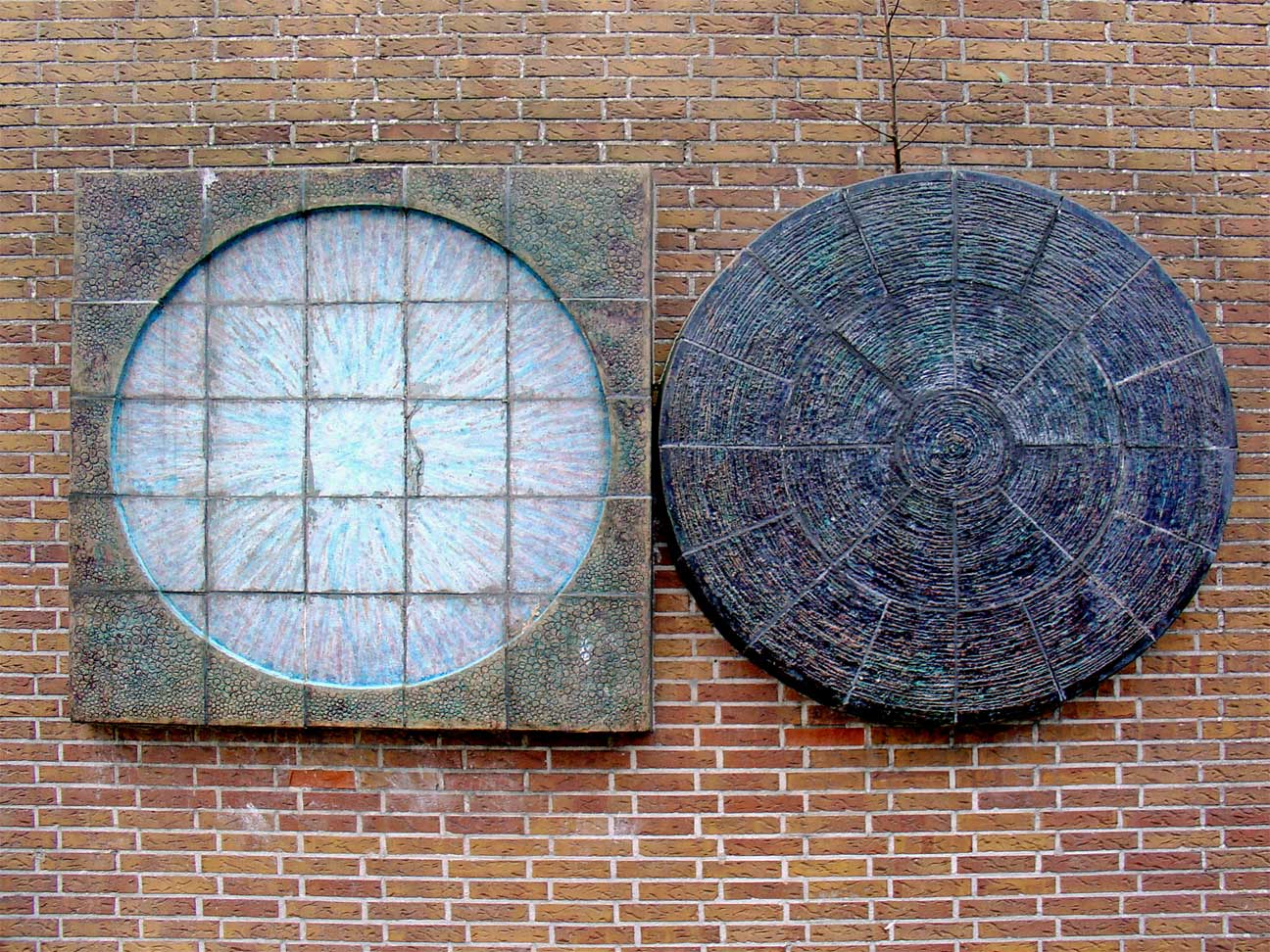 Living-stone (keramiek, reliëf, 1974) door Maarten Witte van Leeuwen - Livingstonelaan Gouda